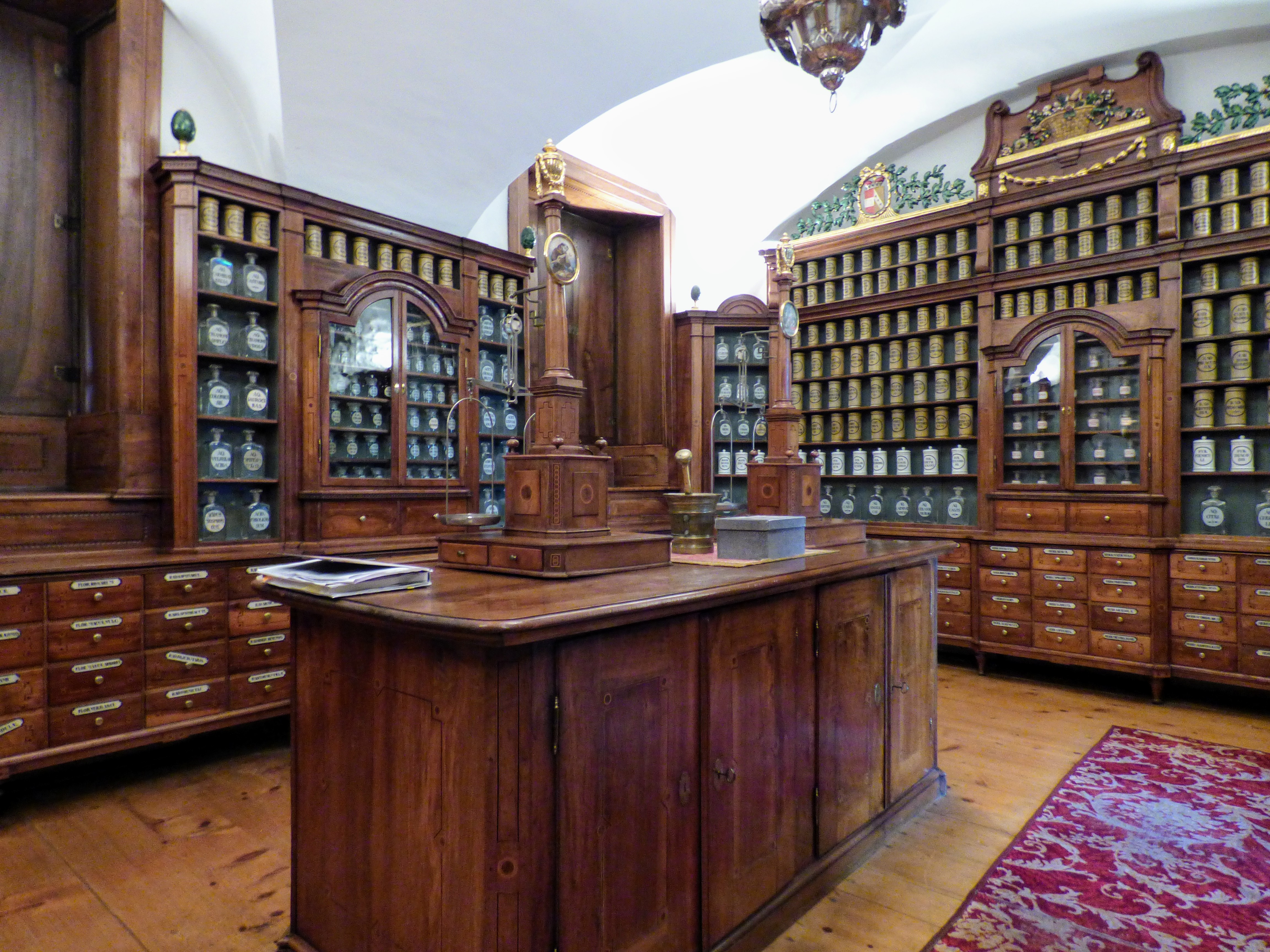 Klagenfurt am Wörthersee: Apotheke im Elisabethinenkloster/Elisabethinenspital Dieses Bild wurde anlässlich des österreichischen Tags des Denkmals 2017 in Kärnten eingereicht. Diese Datei wurde im Rahmen von WikiDaheim 2017 in Österreich erstellt und hochgeladen.Sie wurde dem Themenbereich Denkmalschutz zugeordnet.